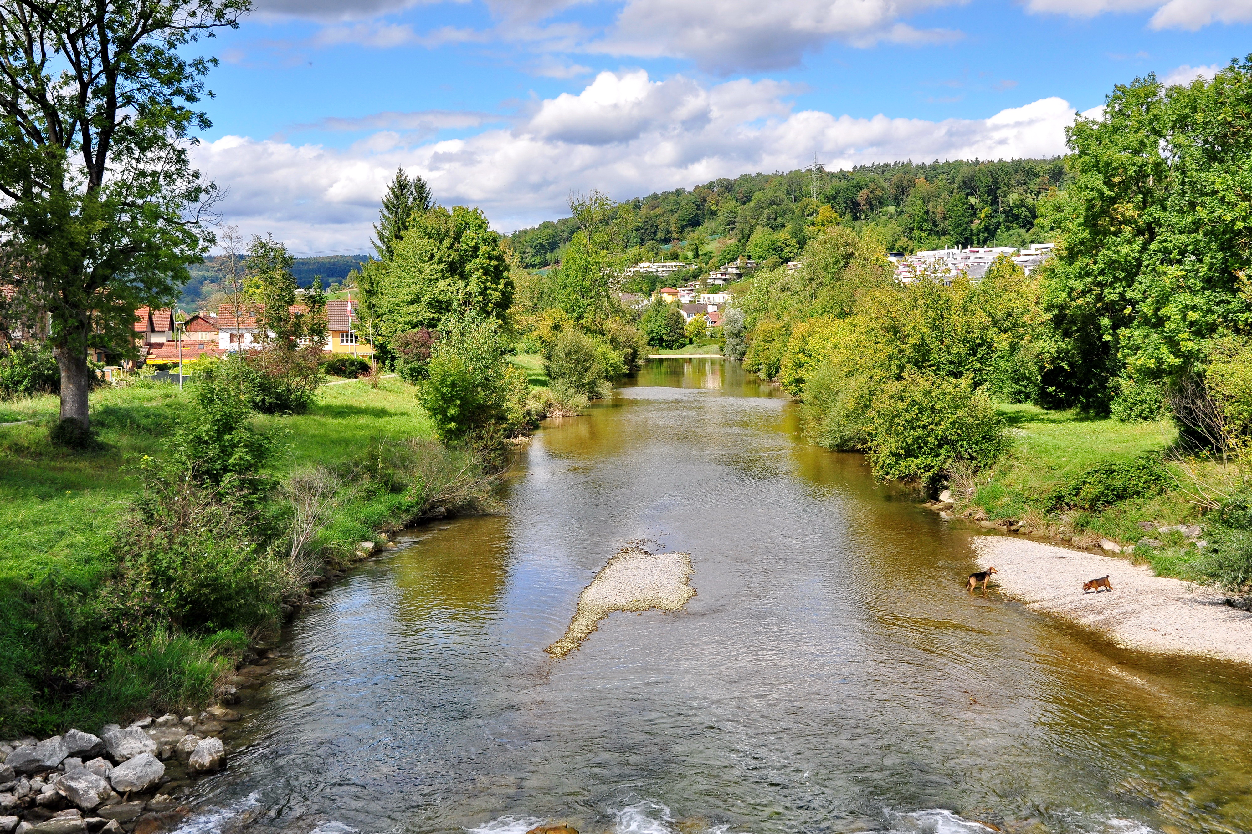 Töss in Wülflingen, Winterthur (Switzerland)